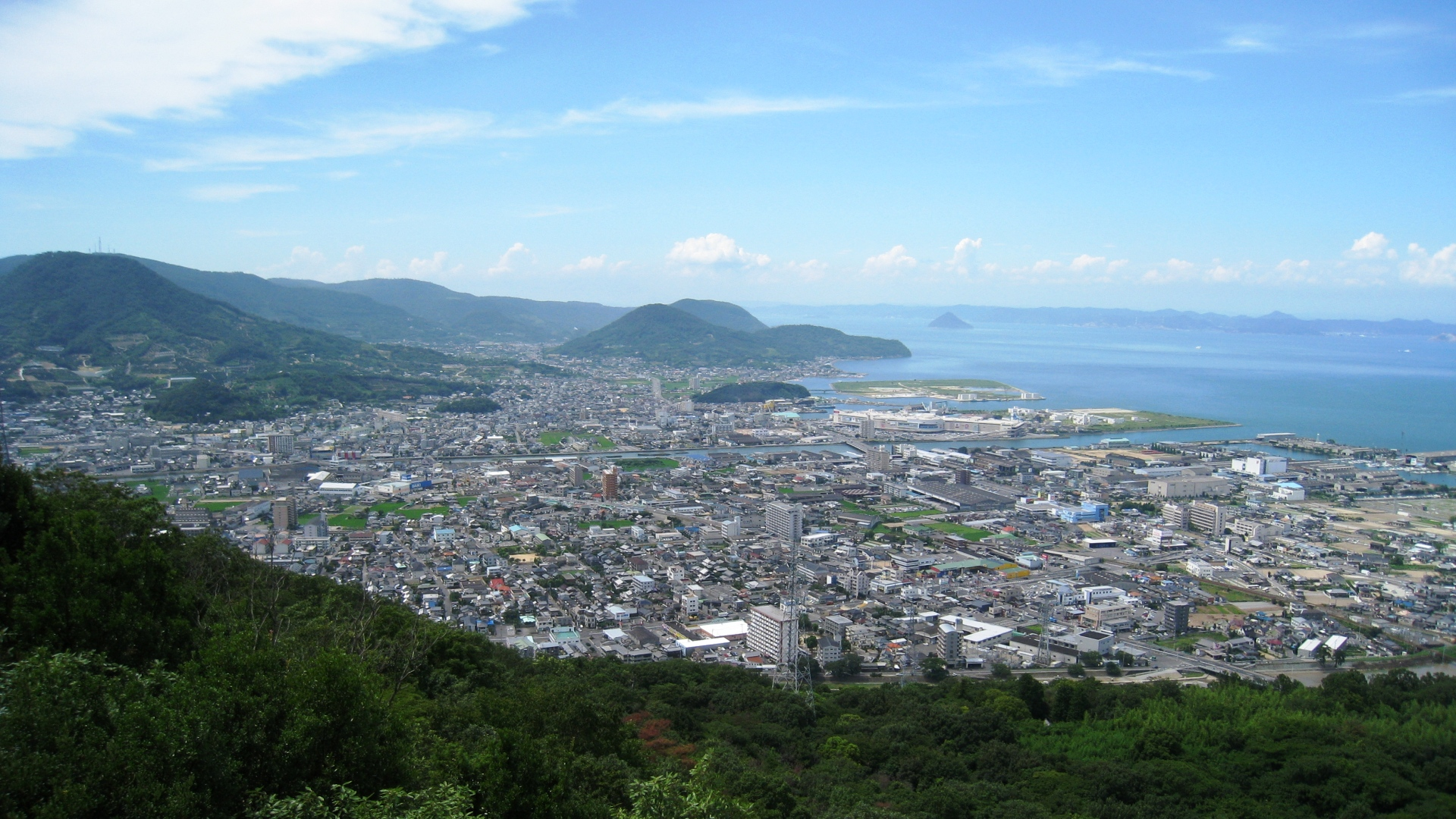 香川県高松市にある石清尾山から西を眺める。本津川より手前が郷東町で奥が香西地区。